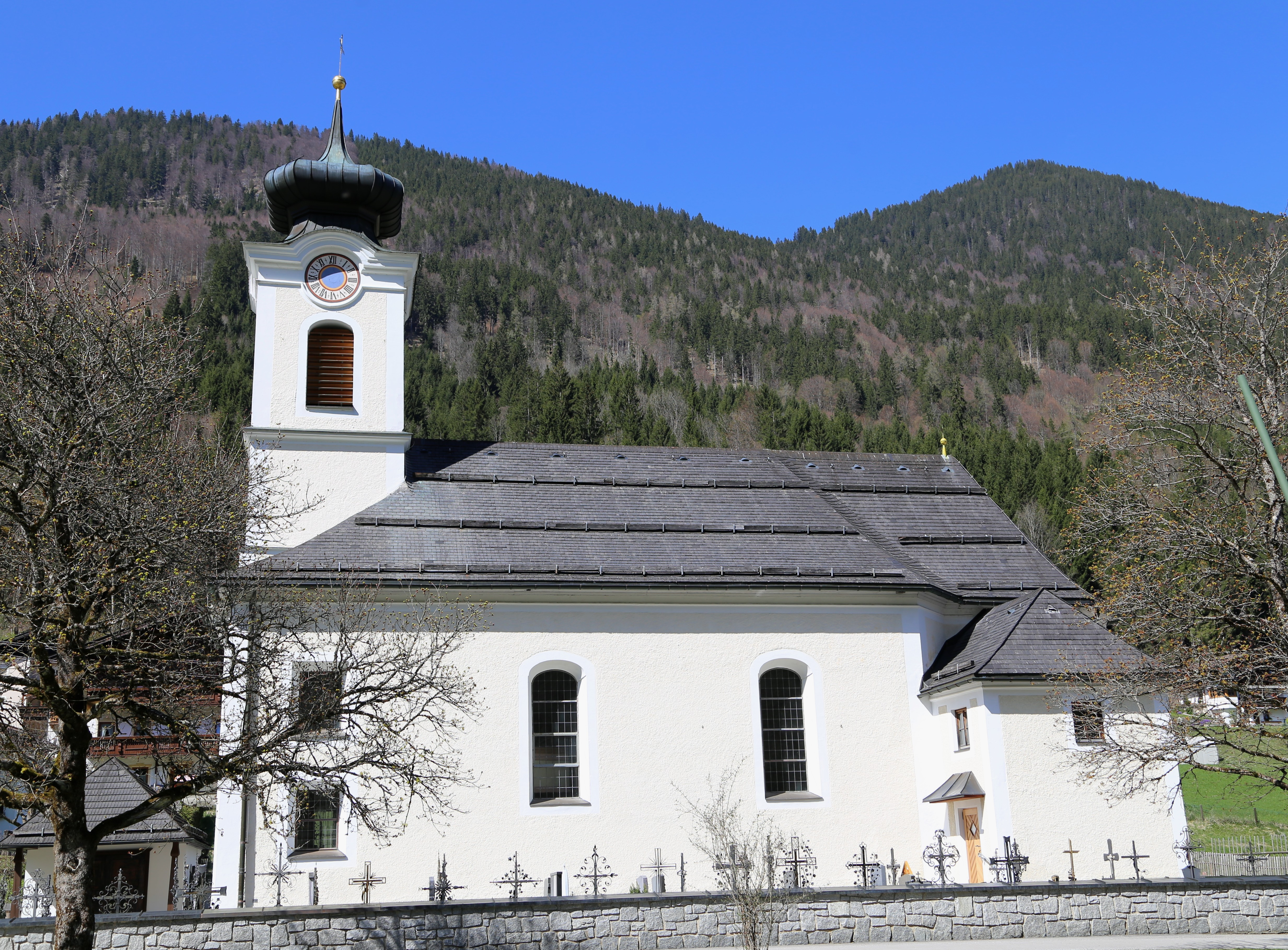 Kath. Pfarrkirche Mariahilf und Friedhof, Landl, Thiersee